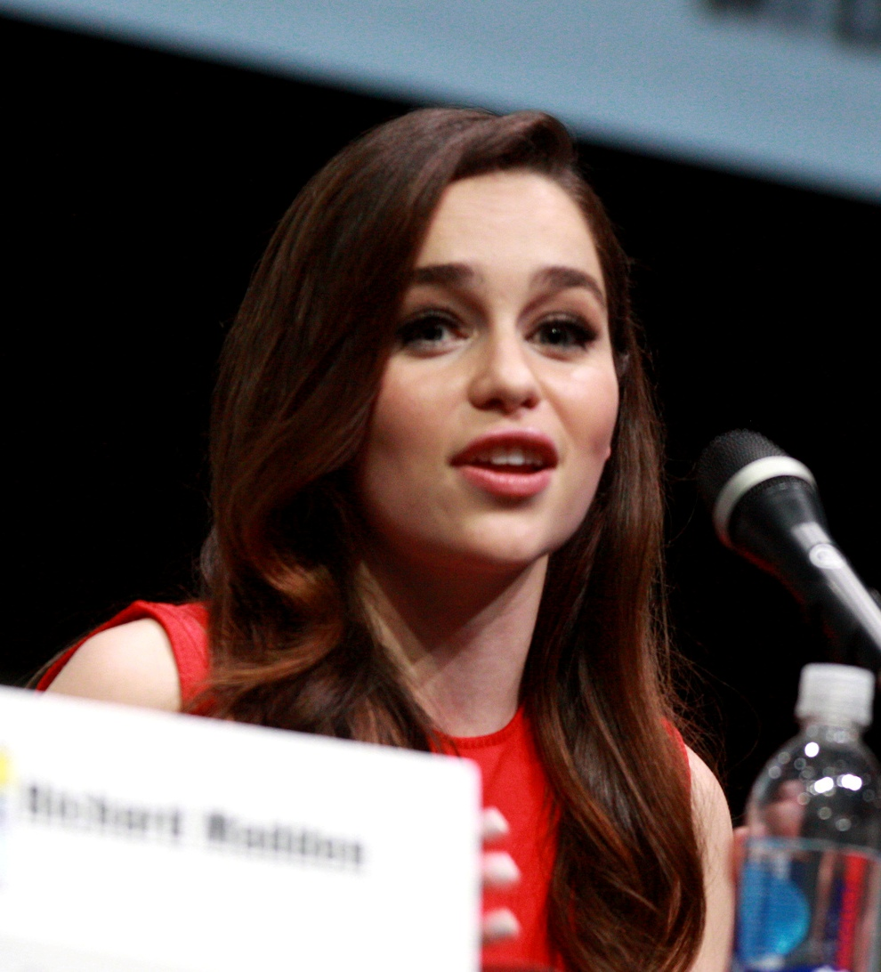 Emilia Clarke à la Comic Con 2013 de San Diego